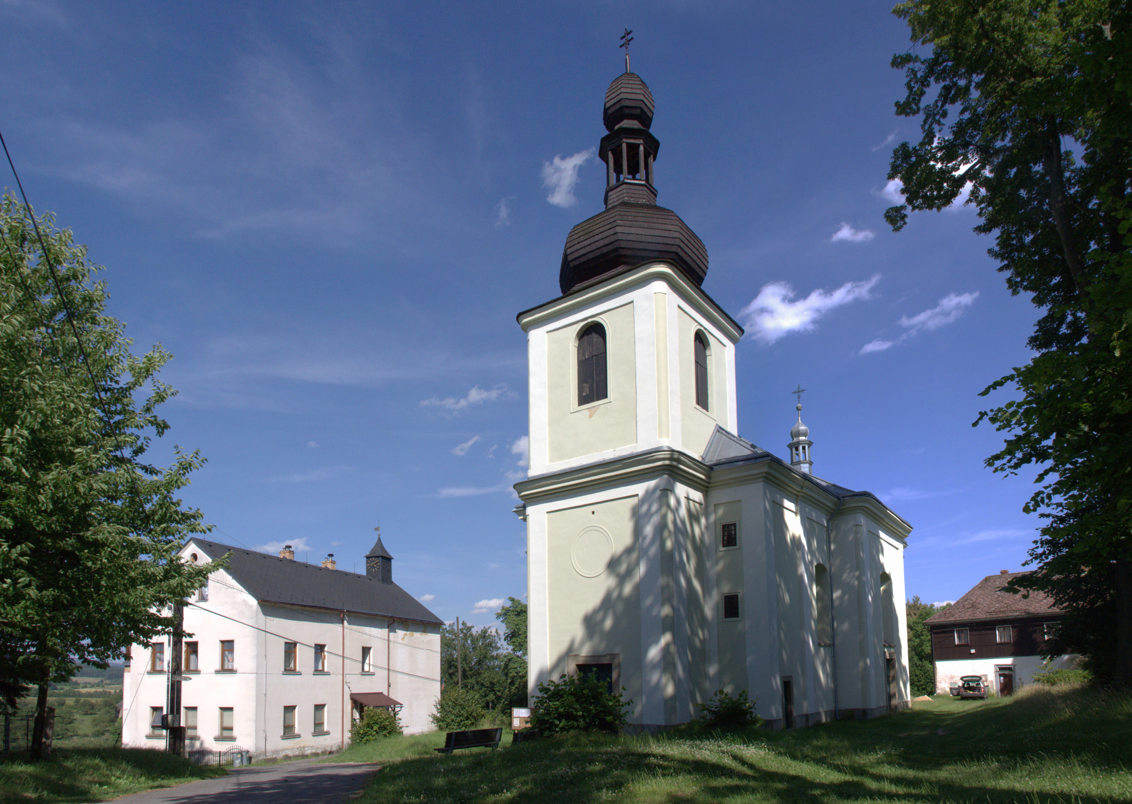 Kostel svatého Linharta s farou, Hlavice (okres Liberec).